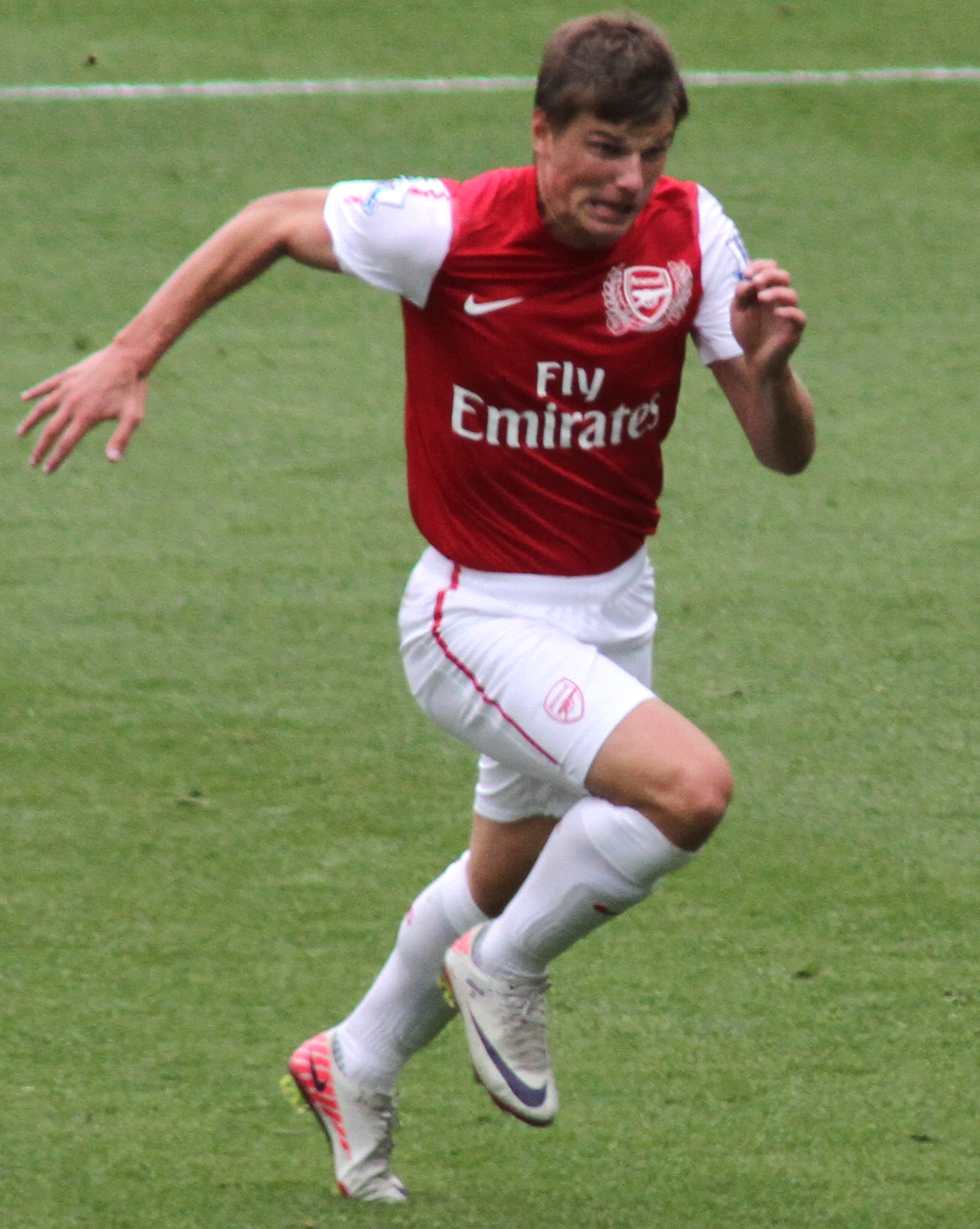 Андрей Аршавин